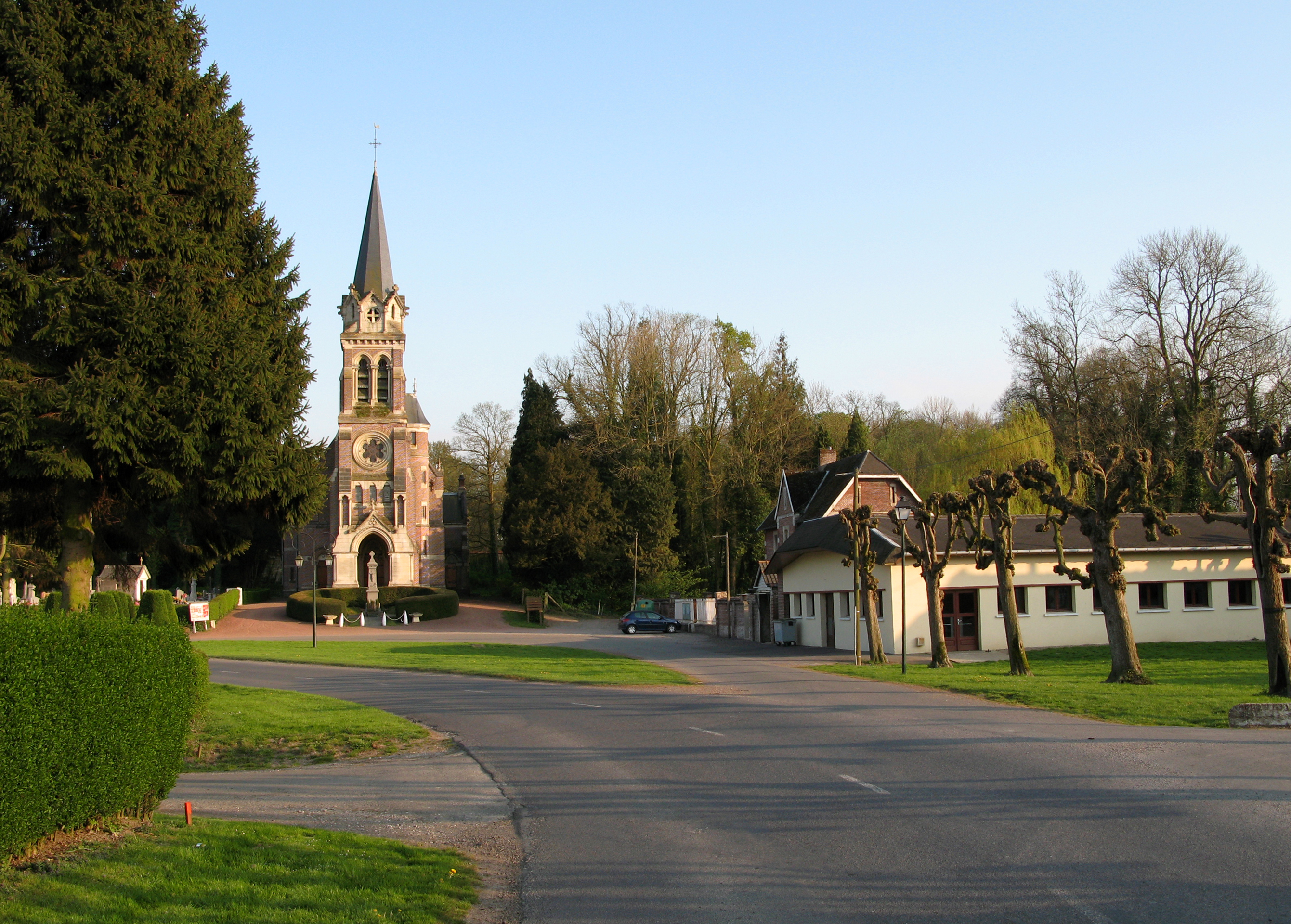 Bryas (Pas-de-Calais, France) - . .